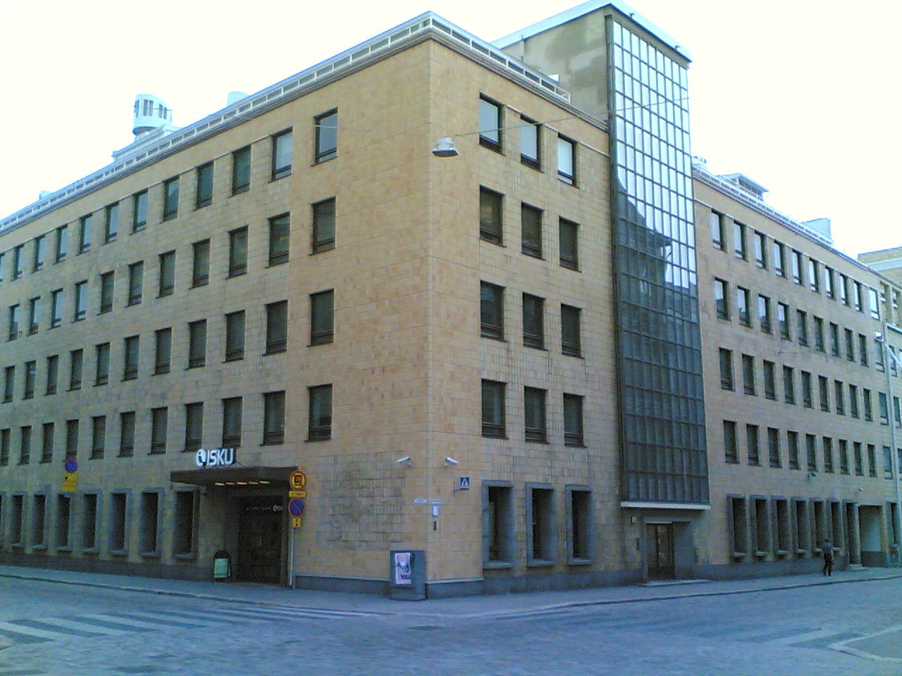 Fabianinkatu 19